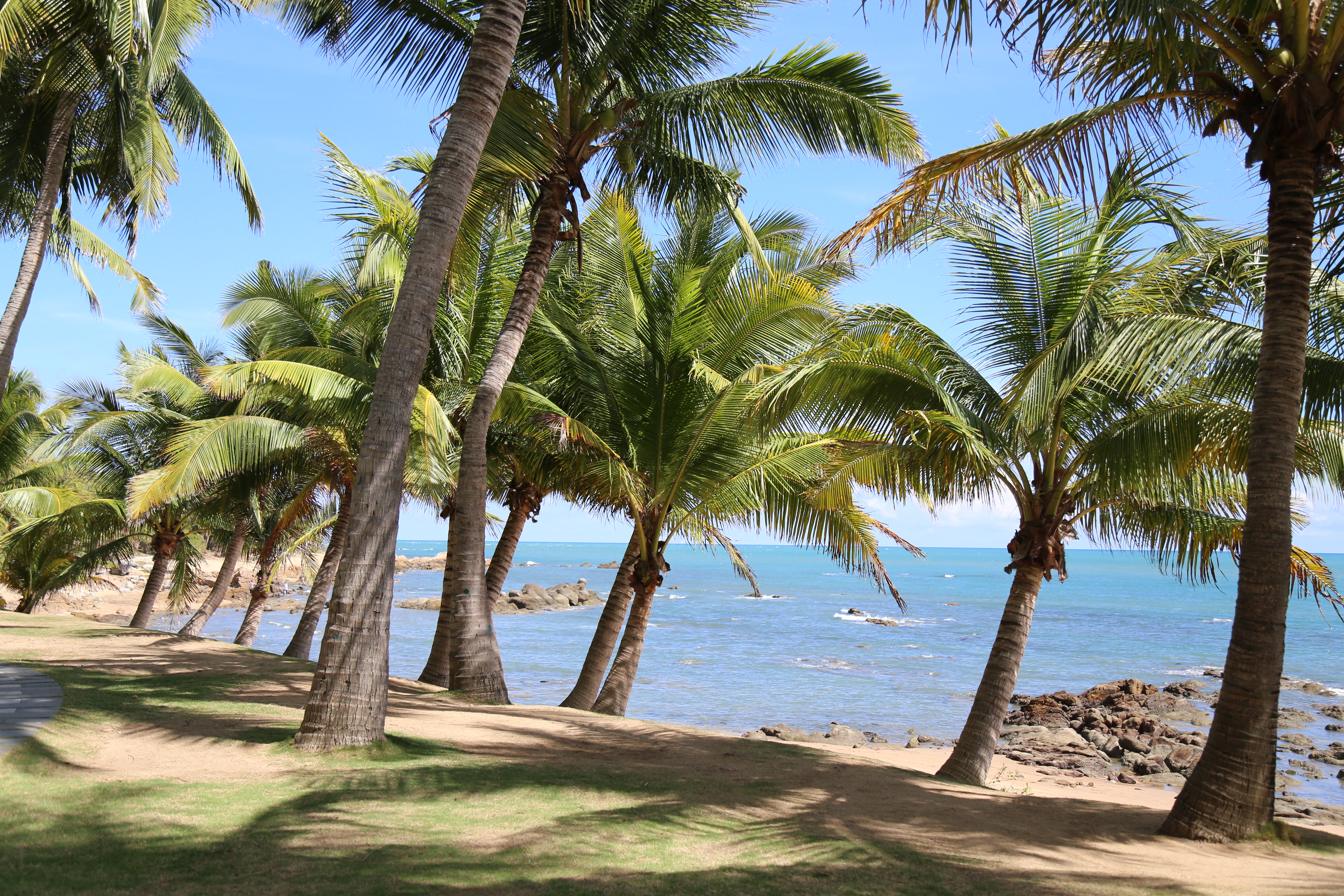 三亚大小洞天景区风光